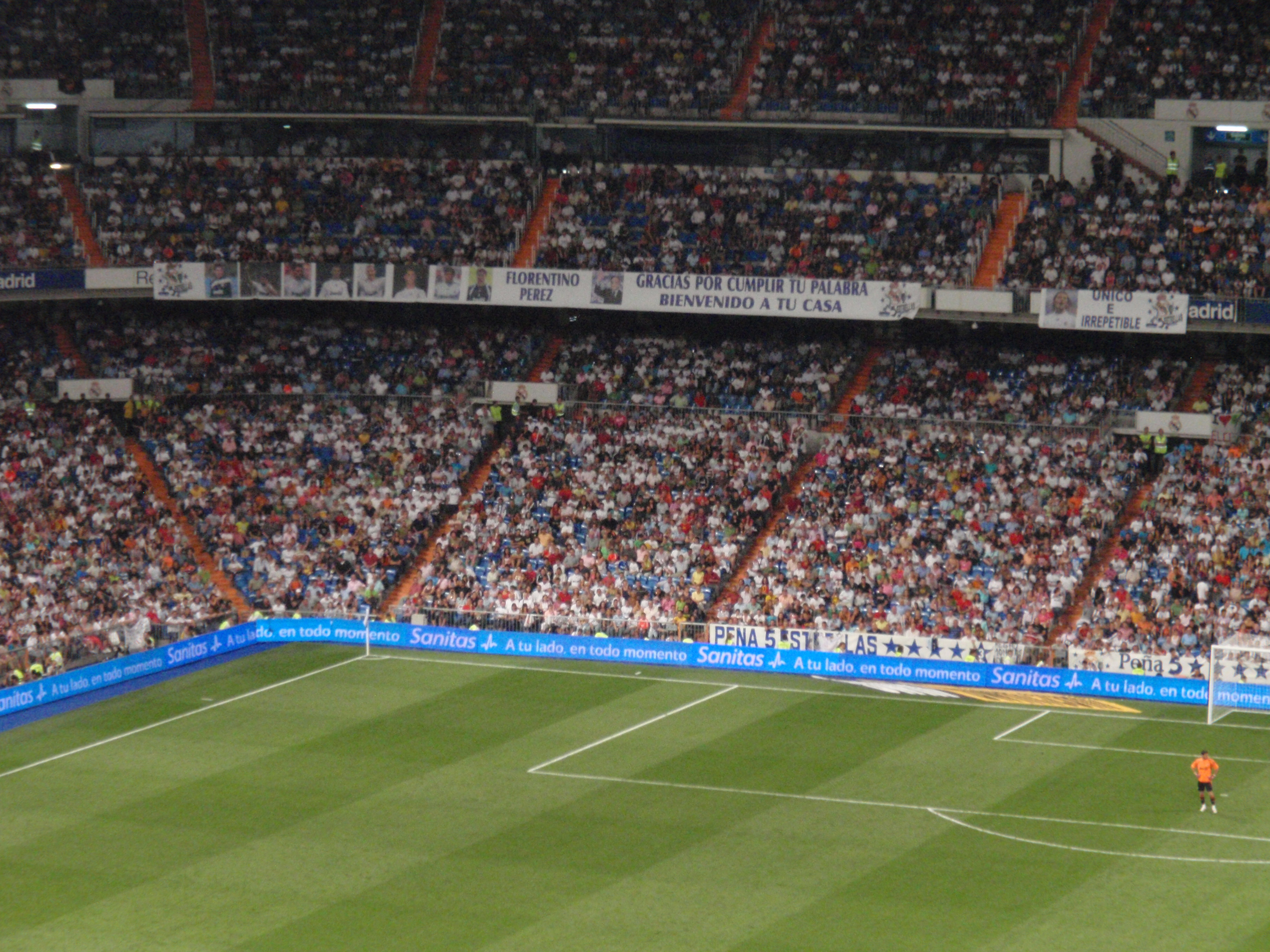 Pancarta de agradecimiento a Florentino Pérez durante el partido Real Madrid - Rosenborg, correspondiente al XXXI Trofeo Santiago Bernabéu.